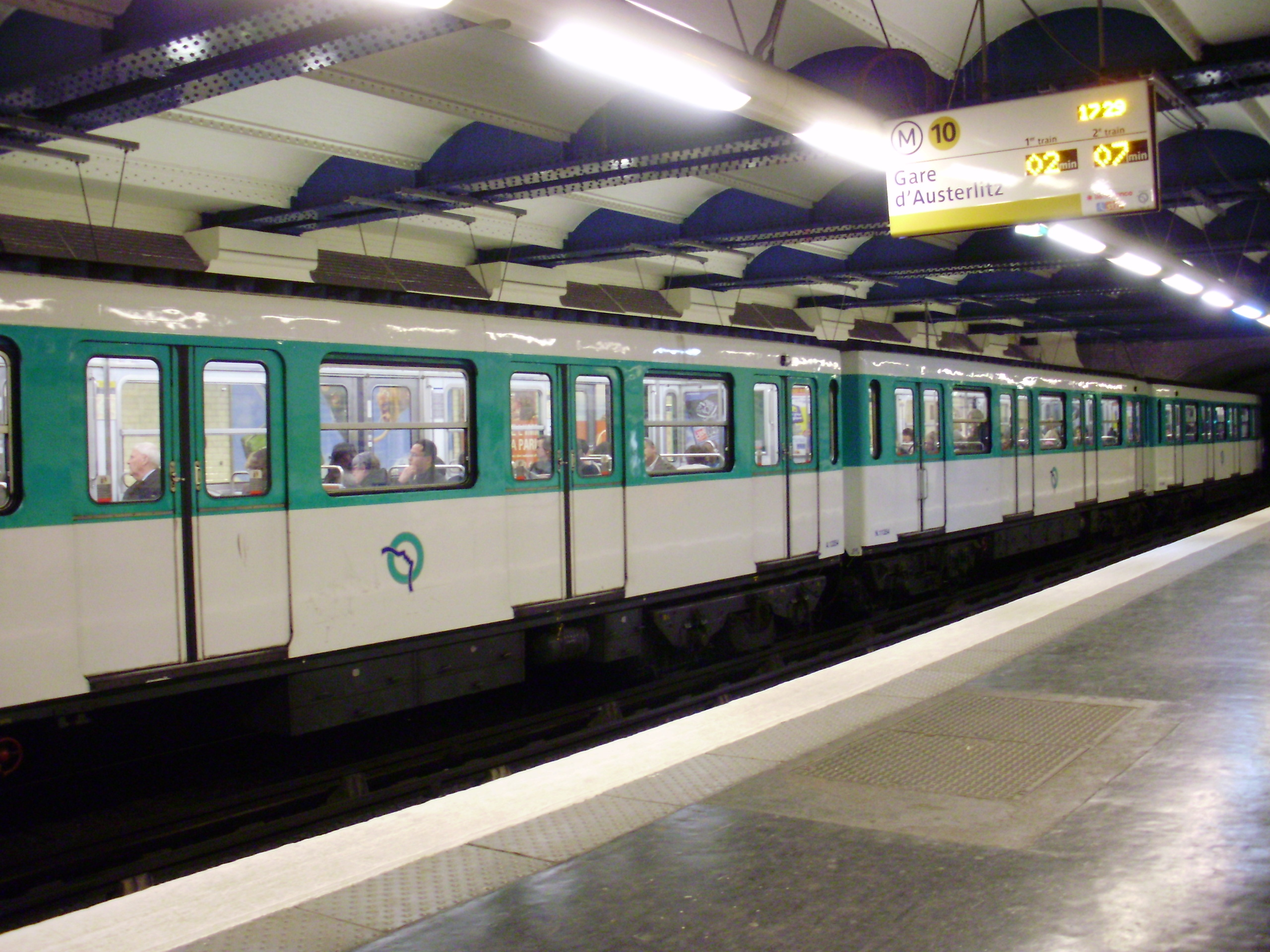 Une rame MF 67 allant vers Boulogne à la station « Avenue Émile Zola » du métro de Paris